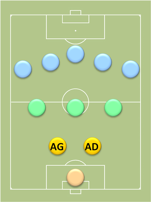 Positions_au_football_des_défenseurs_dans_un_2-3-5_(schéma_classique)